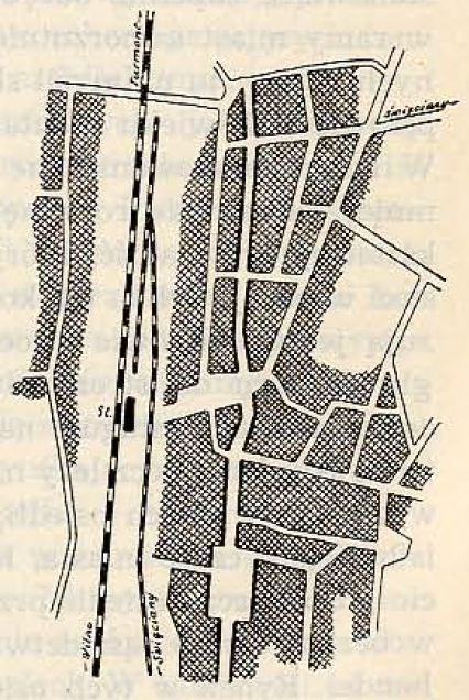 Беларуская (тарашкевіца): Новыя Сьвянцяны (Novyja Śvianciany). Плян